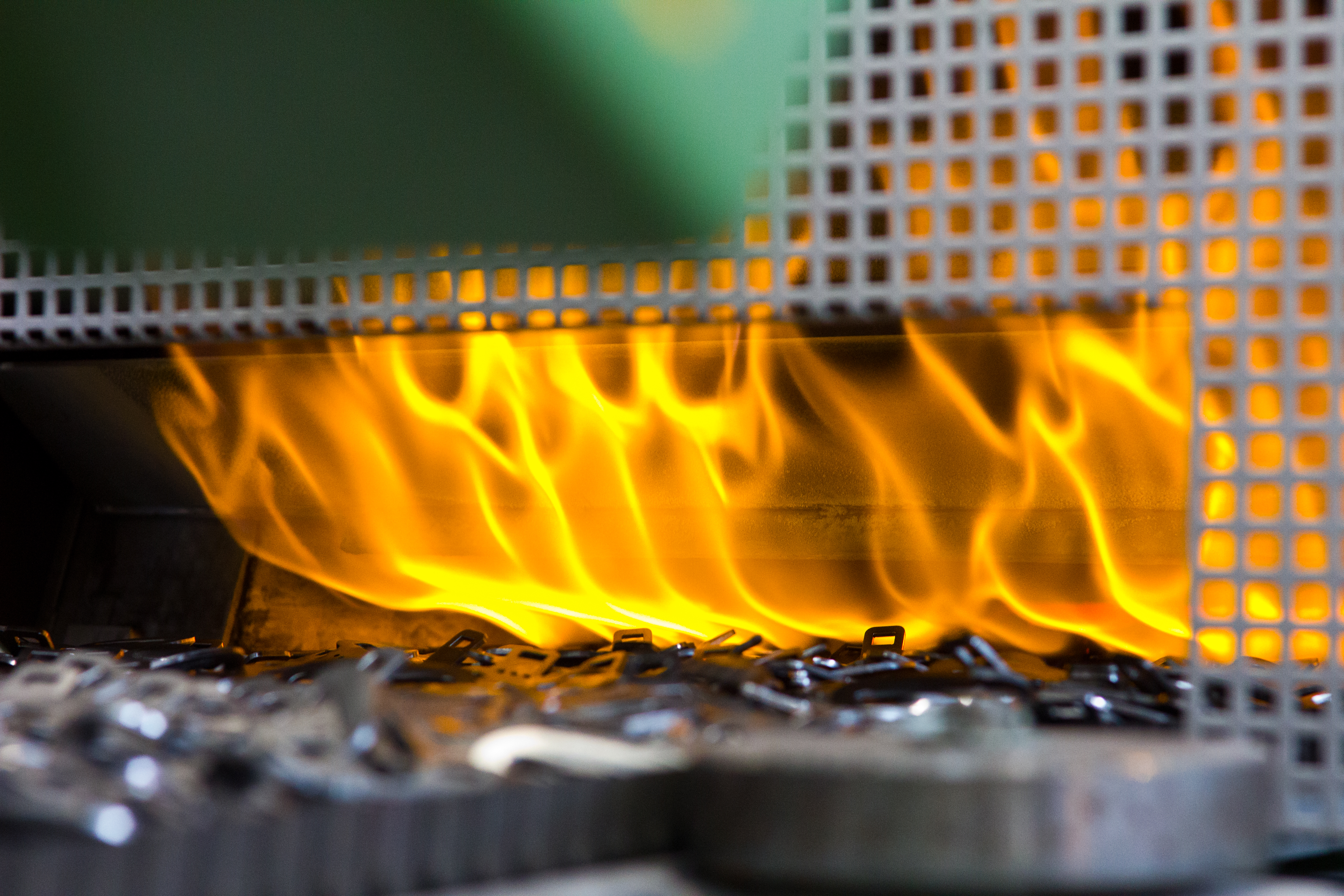 Pilt tehtud AS Normas.